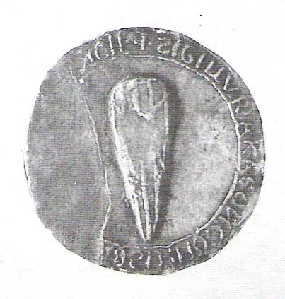 «vexillum nostrum» ('nuestra enseña') de Alfonso II de Aragón. Escudo con el señal real y con bloca. Fue concedido en 1187 a la villa de Millau. Leyenda: SIGILLU[M] R[EGIS] ARAGON[ENSIS] COMITIS BA[RCHINONENSIS ET MARCHIONIS PROVI]NCIE Es el más antiguo conocido de «escudo de armas» como emblema de esta tipología